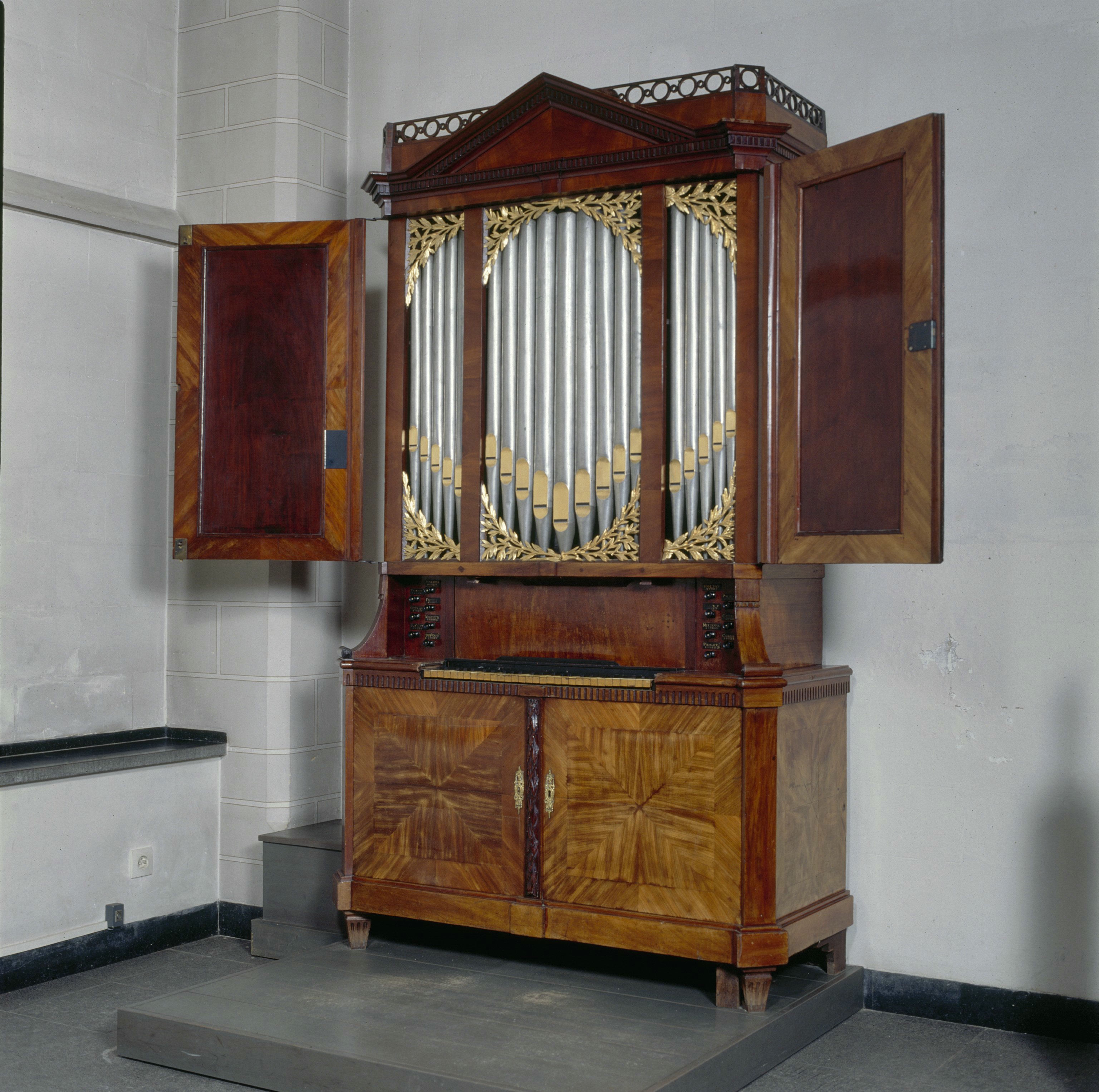 Sint Servaaskerk: Interieur dagkapel, aanzicht kabinetorgel, orgelnummer 926 (opmerking: Gefotografeerd voor Het Historische Orgel in Nederland 1790-1818)